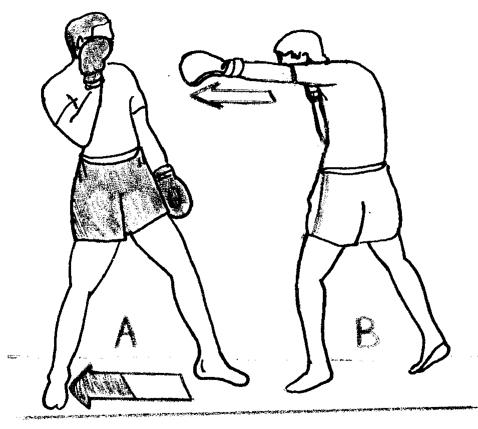 pas_de_retrait.jpg